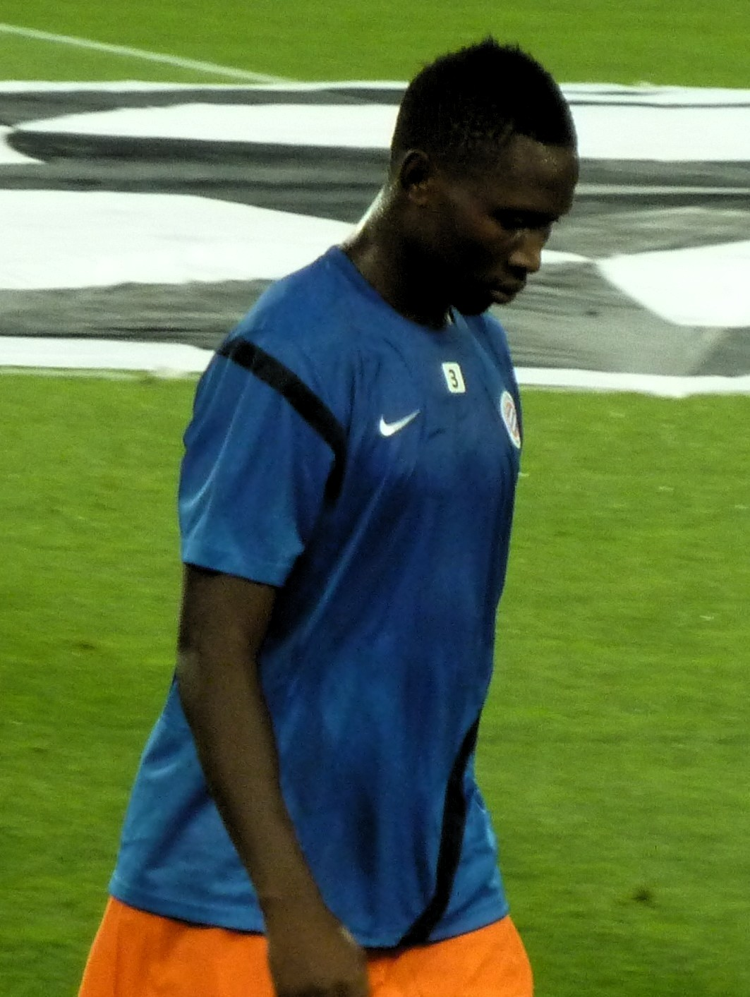 Mapou Yanga-Mbiwa en Ligue des Champions (match MHSC - Arsenal) le 18.09.2012 (crop).